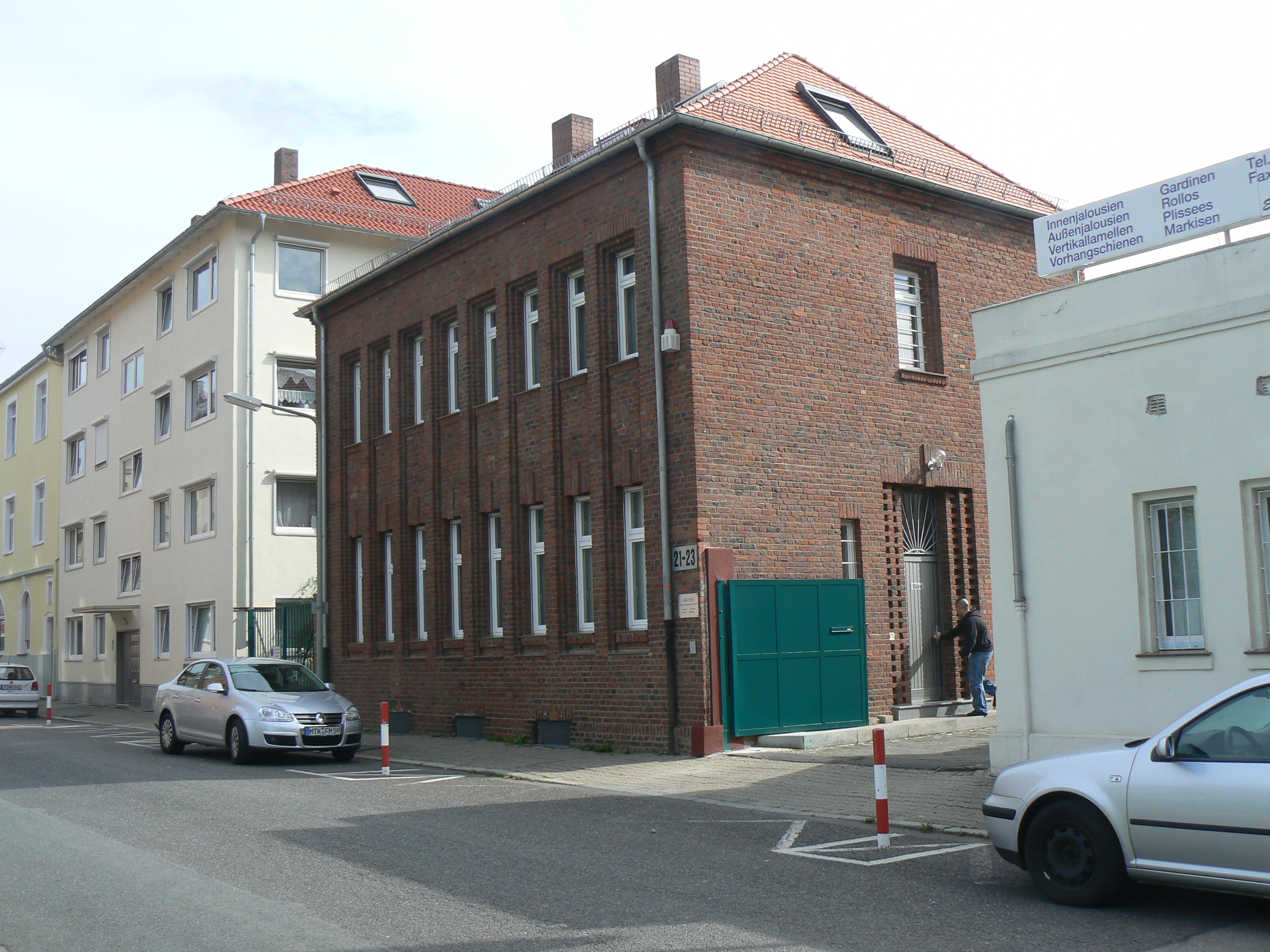 denkmalgeschütztes ehemaliges Verwaltungsgebäude der Lastkraftwagen-Garage der Ndl. der Mannesmann MULAG AG, Aachen mit parabolisch angeordnetem Garagenbau der von BDA Ernst Balser (1893-1964) und Franz Heberer (1883-1955). Bauzeit 1922-24, Frankfurt, Hersfelder Straße 21-23